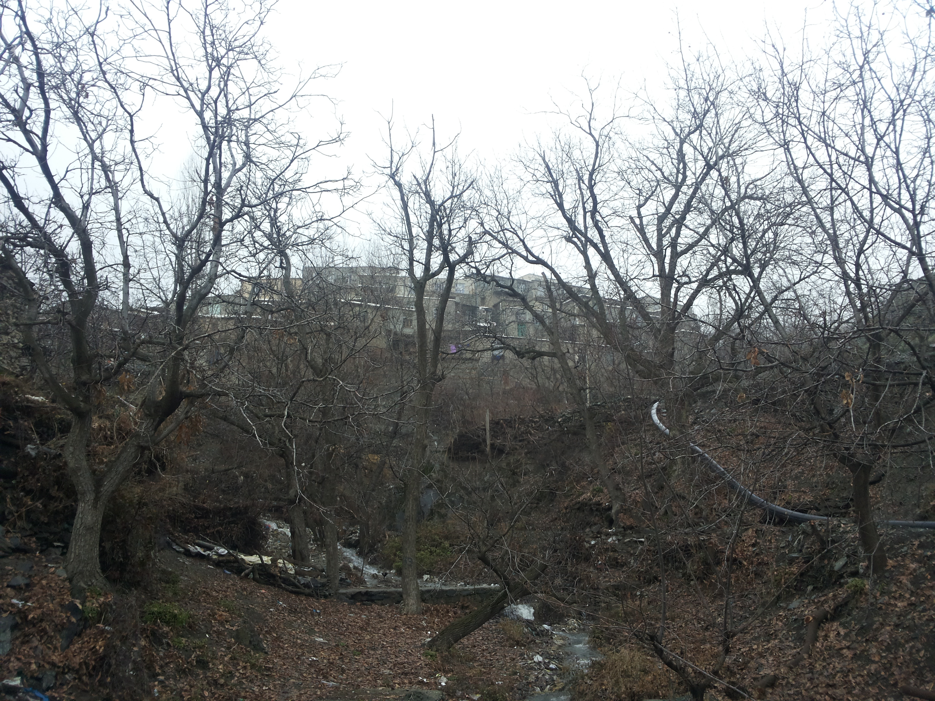 Kurdî: وێنەیەک لە گوندی ھەزارخانی لە نزیکی شاری مەریواندا